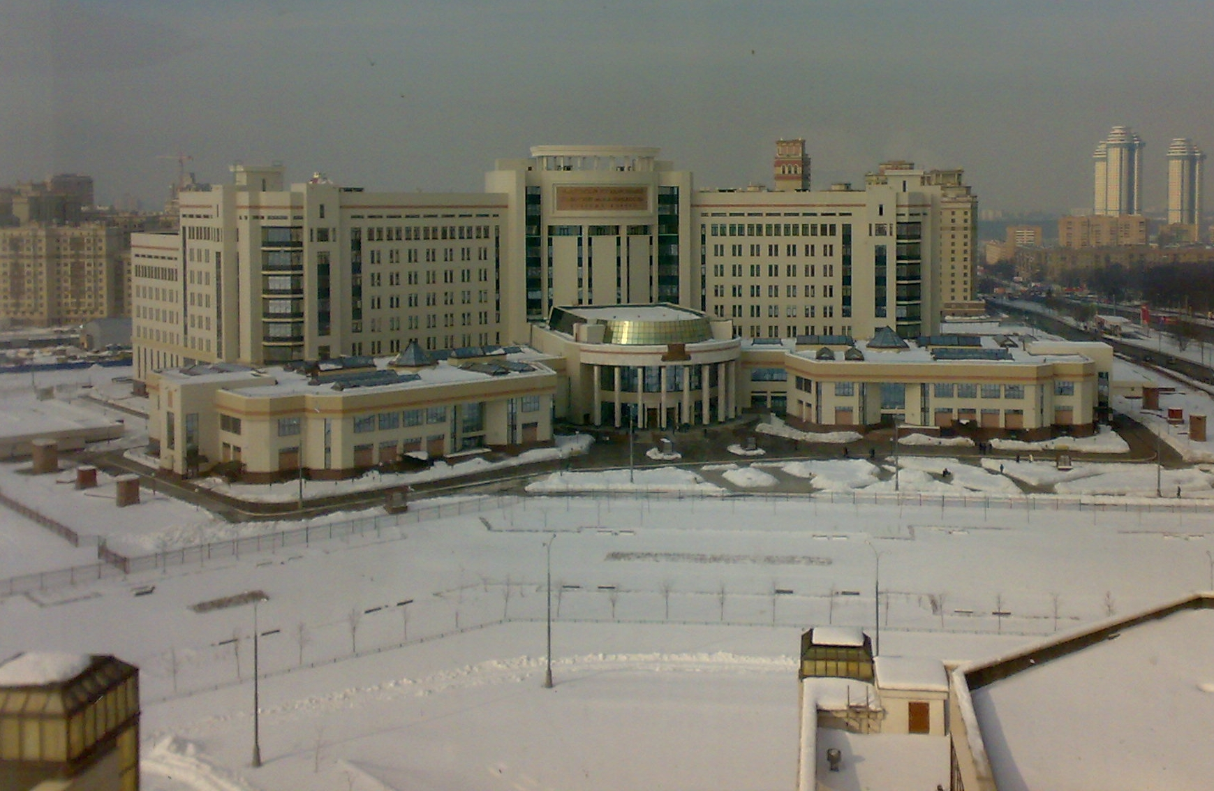 Первый учебный корпус МГУ